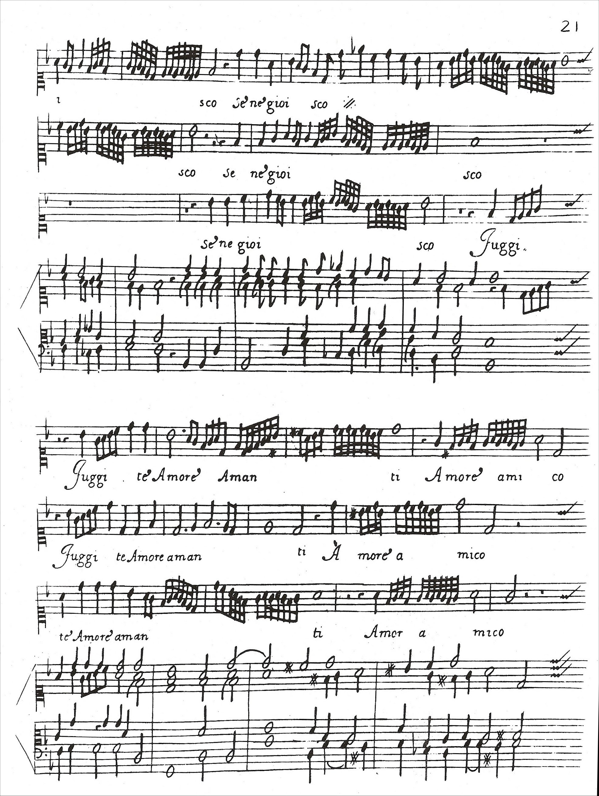 second page of "O dolcezz'amarissime" from Madrigali a uno, e'doi, e'tre soprani by Luzzasco Luzzaschi.